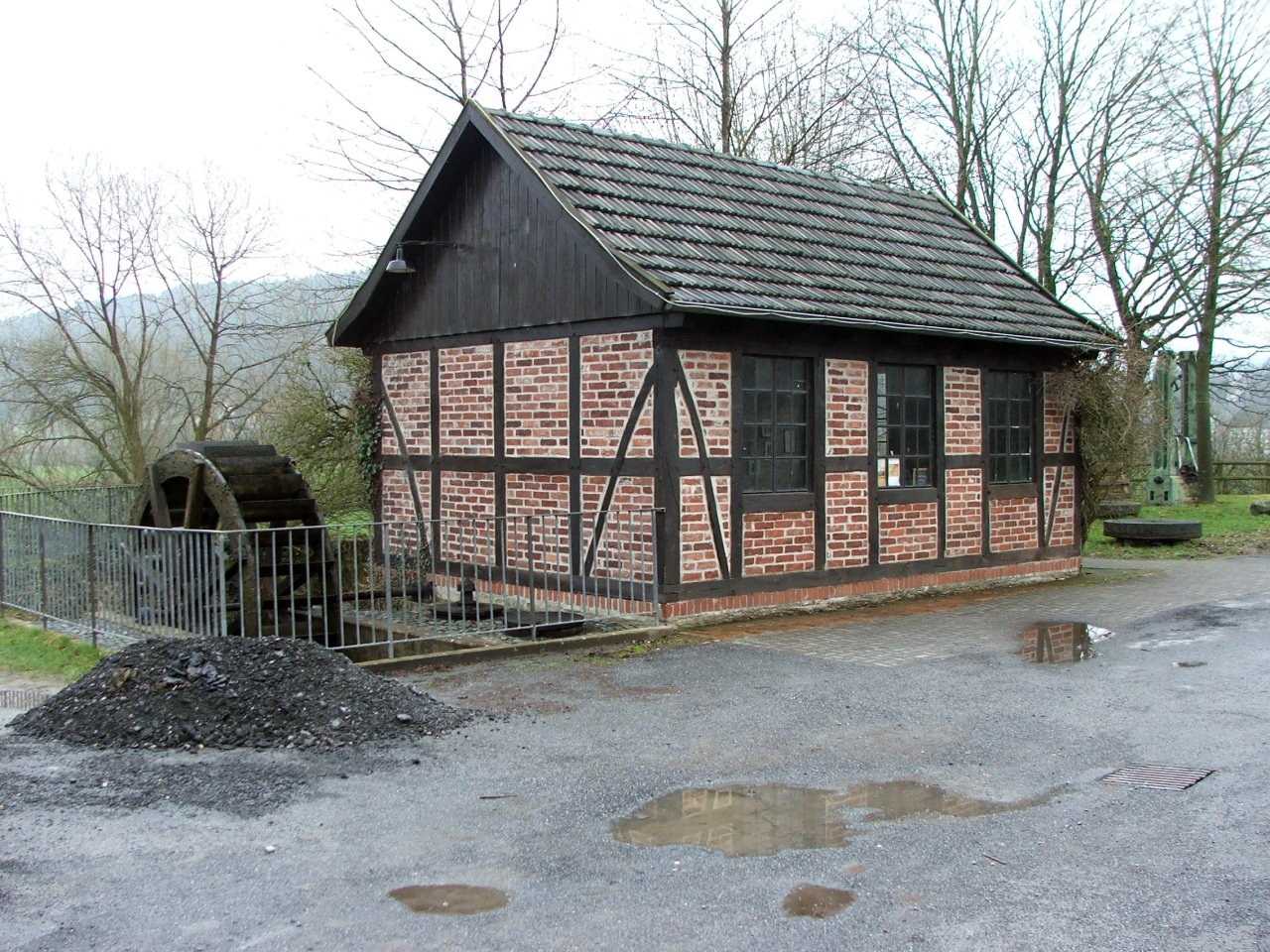 Kettenschmiedemuseum in Sichtigvor/Deutschland